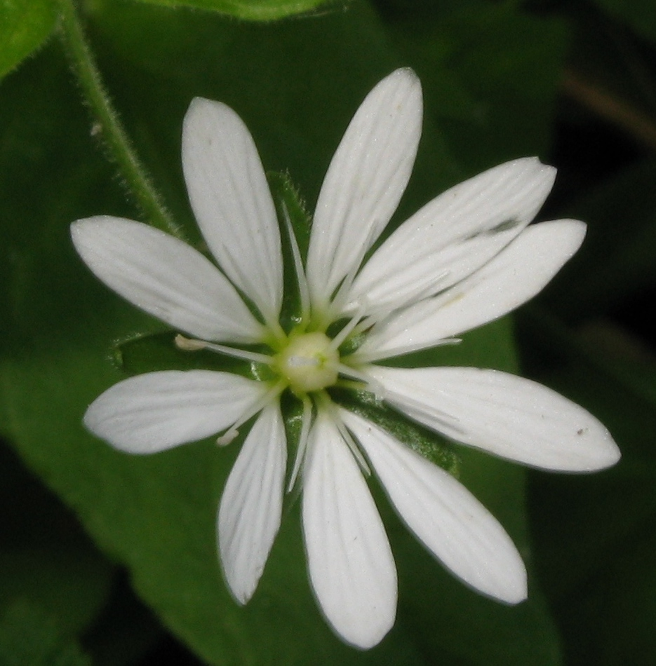 Цветок звездчатки Бунге (Stellaria bungeana). Красноярский край, Западный Саян.